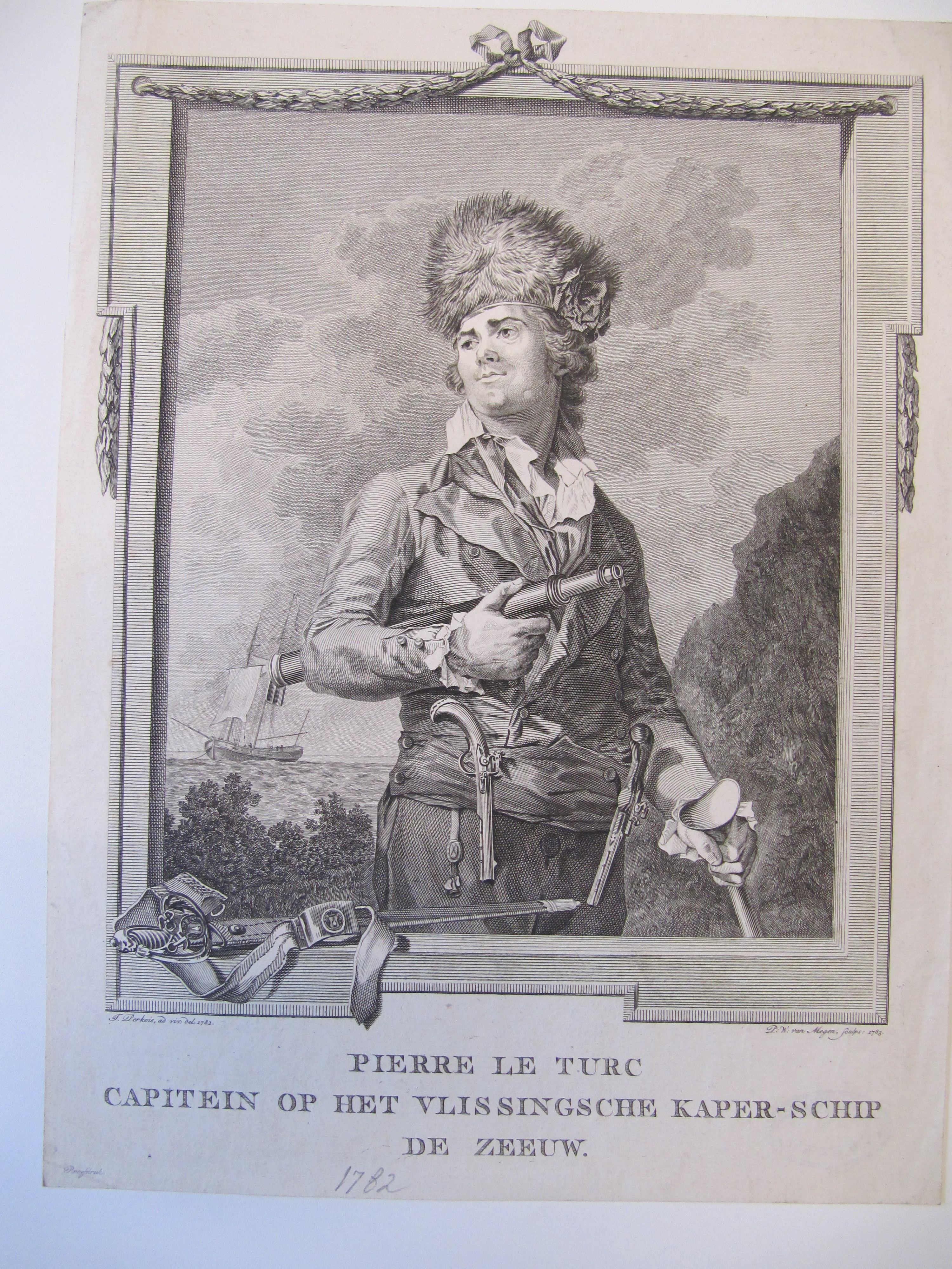 Pierre le Turcq overl. 1784